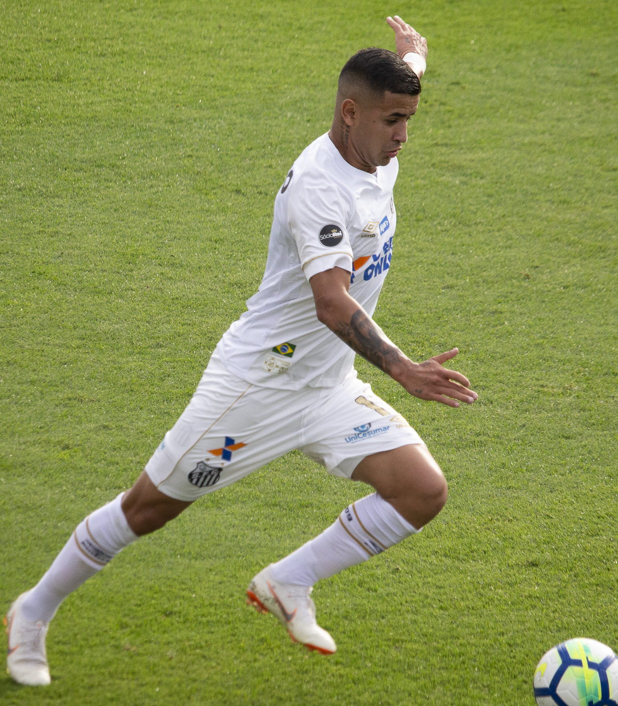 Foto: Douglas Teixeira/Futebol Santista